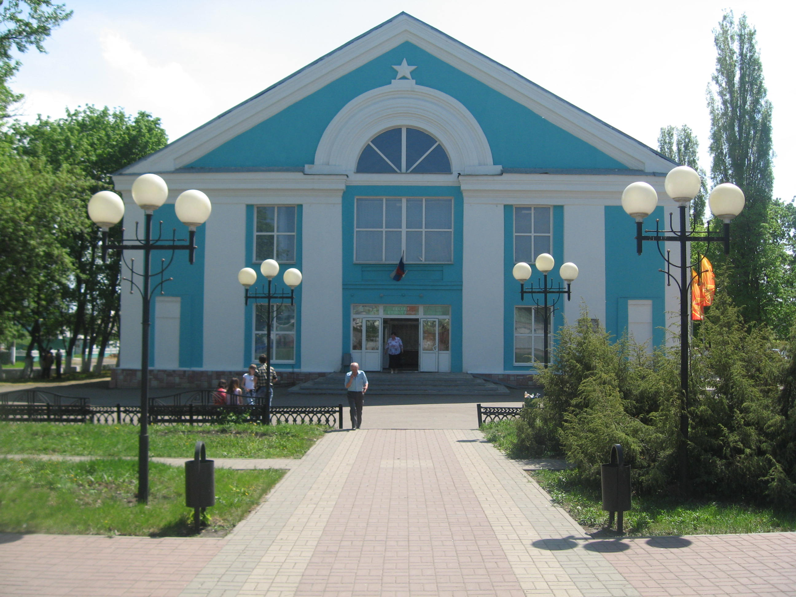 Видно здание.